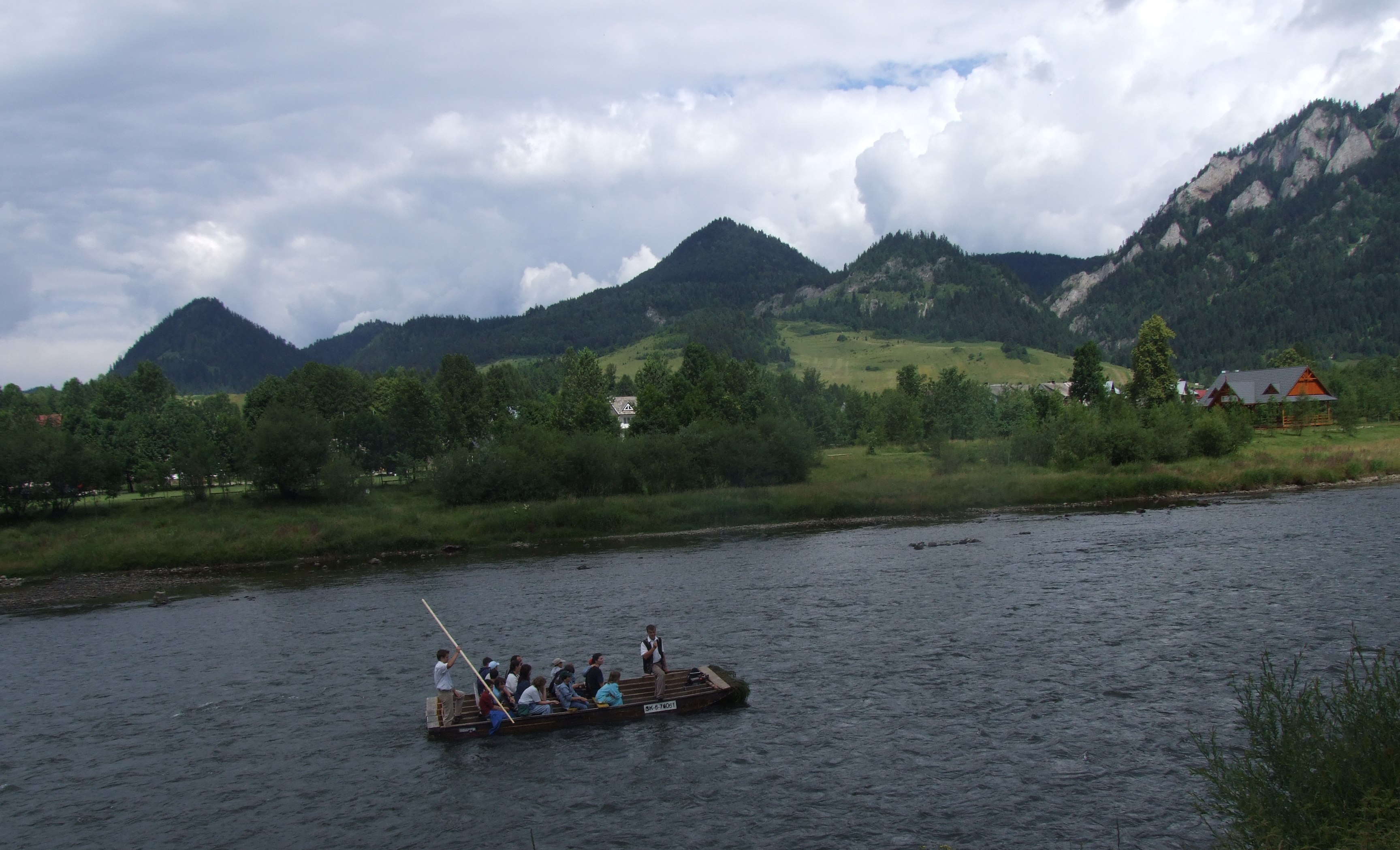 Pieniny - widok z Czerwonego Klasztoru